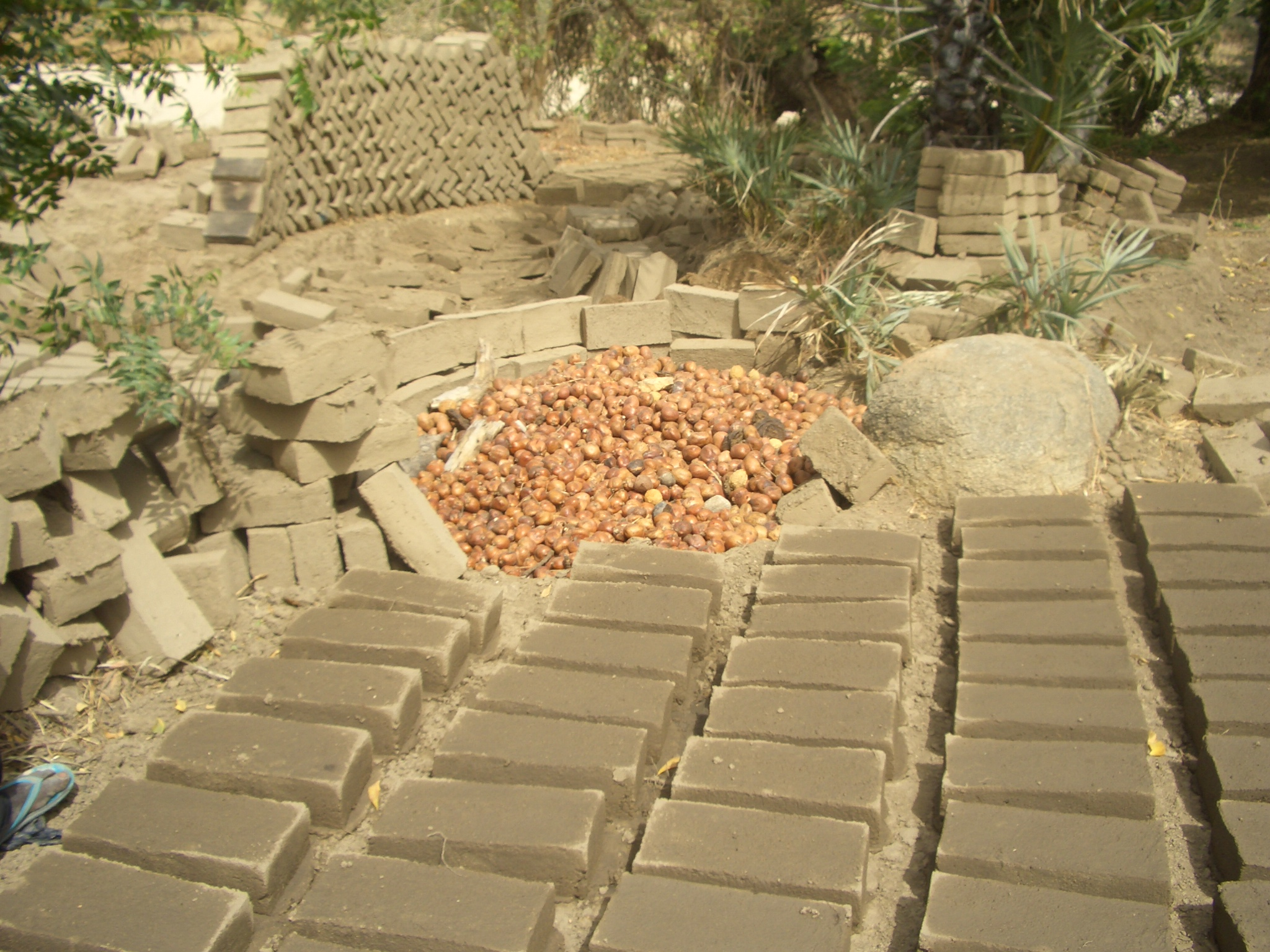 Lehmziegel mit Palmfrüchten vor dem Brennen in Tréné (Tschad)